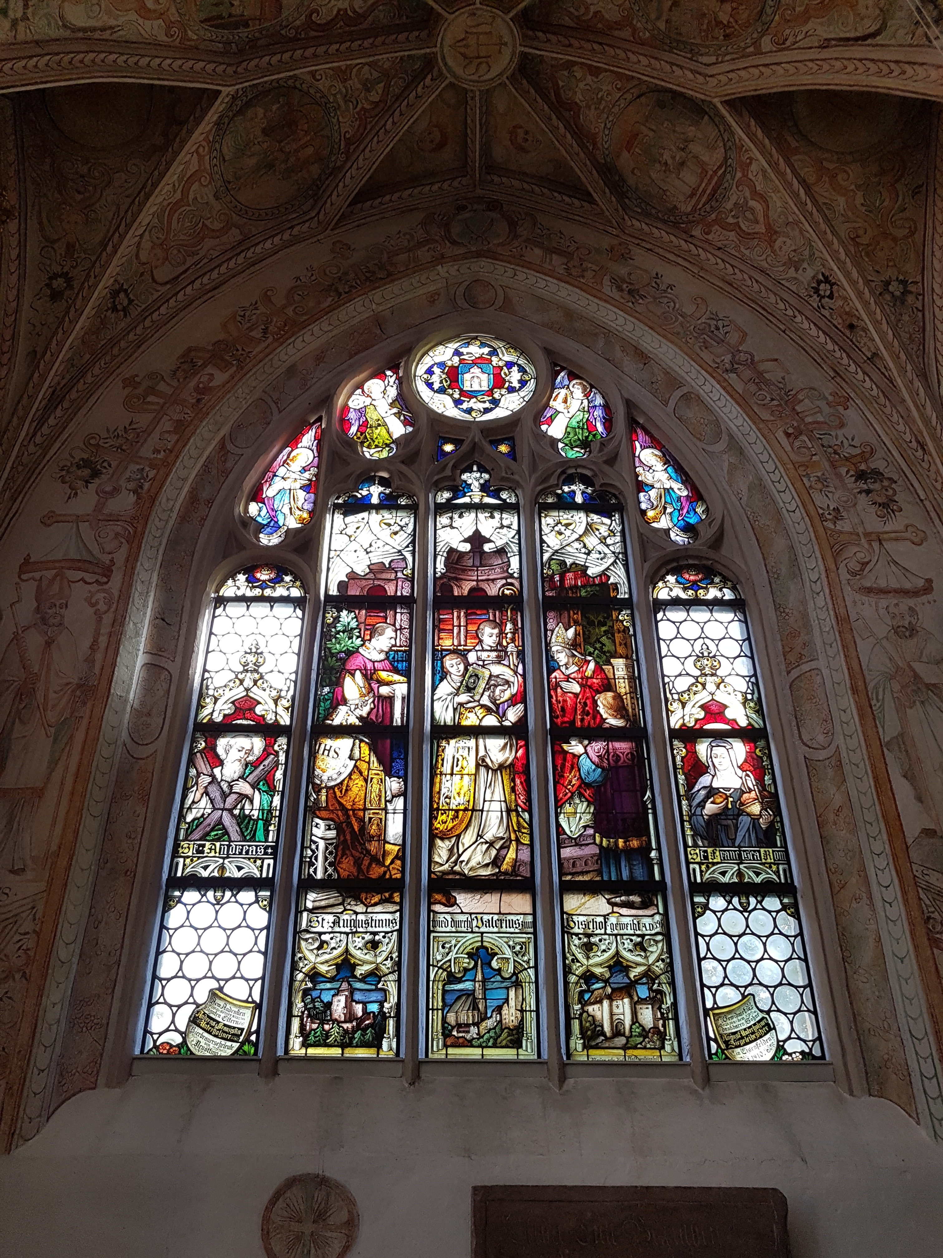 St. Nikolaus (Neuötting)